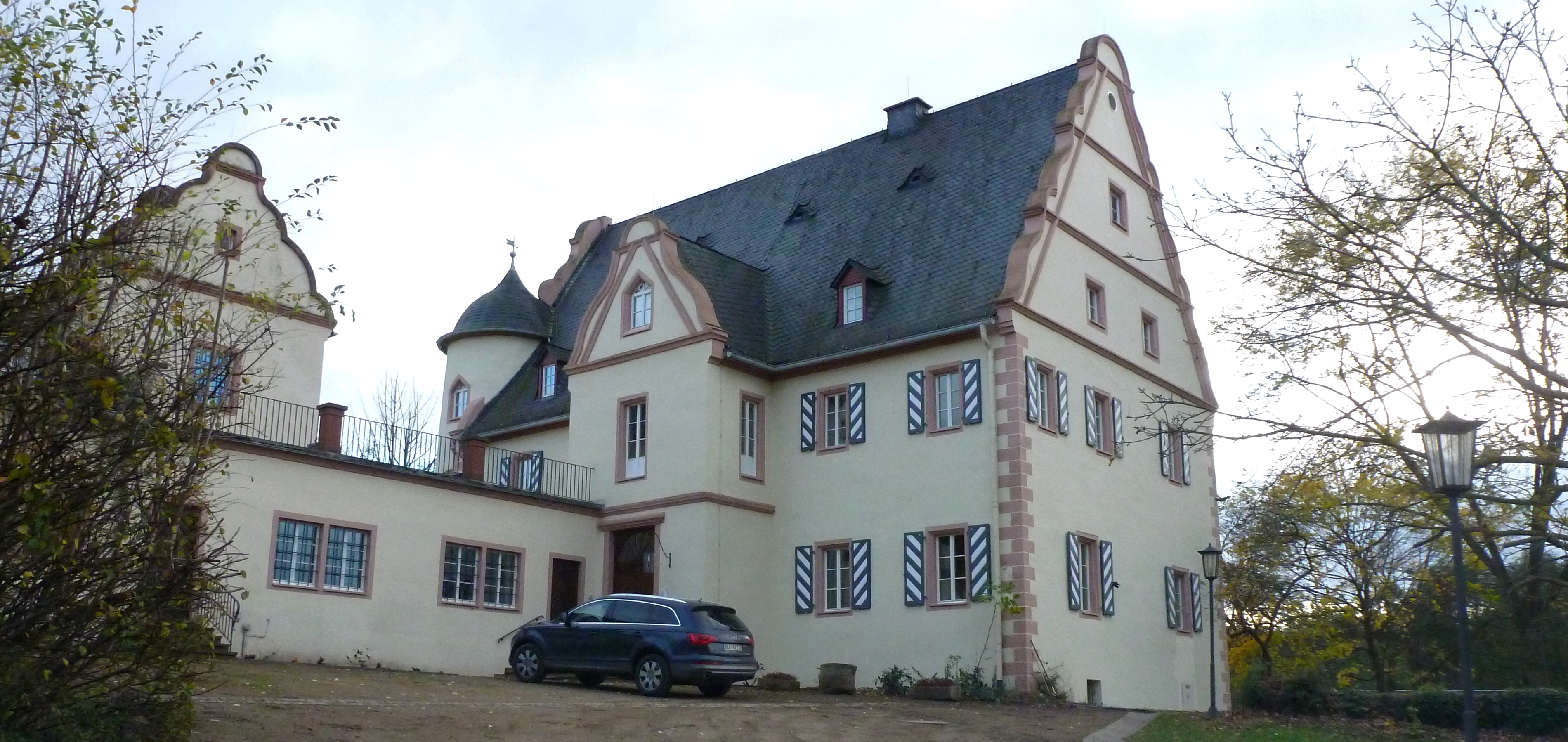 Deitsch: Heidesheim Schlossmühle